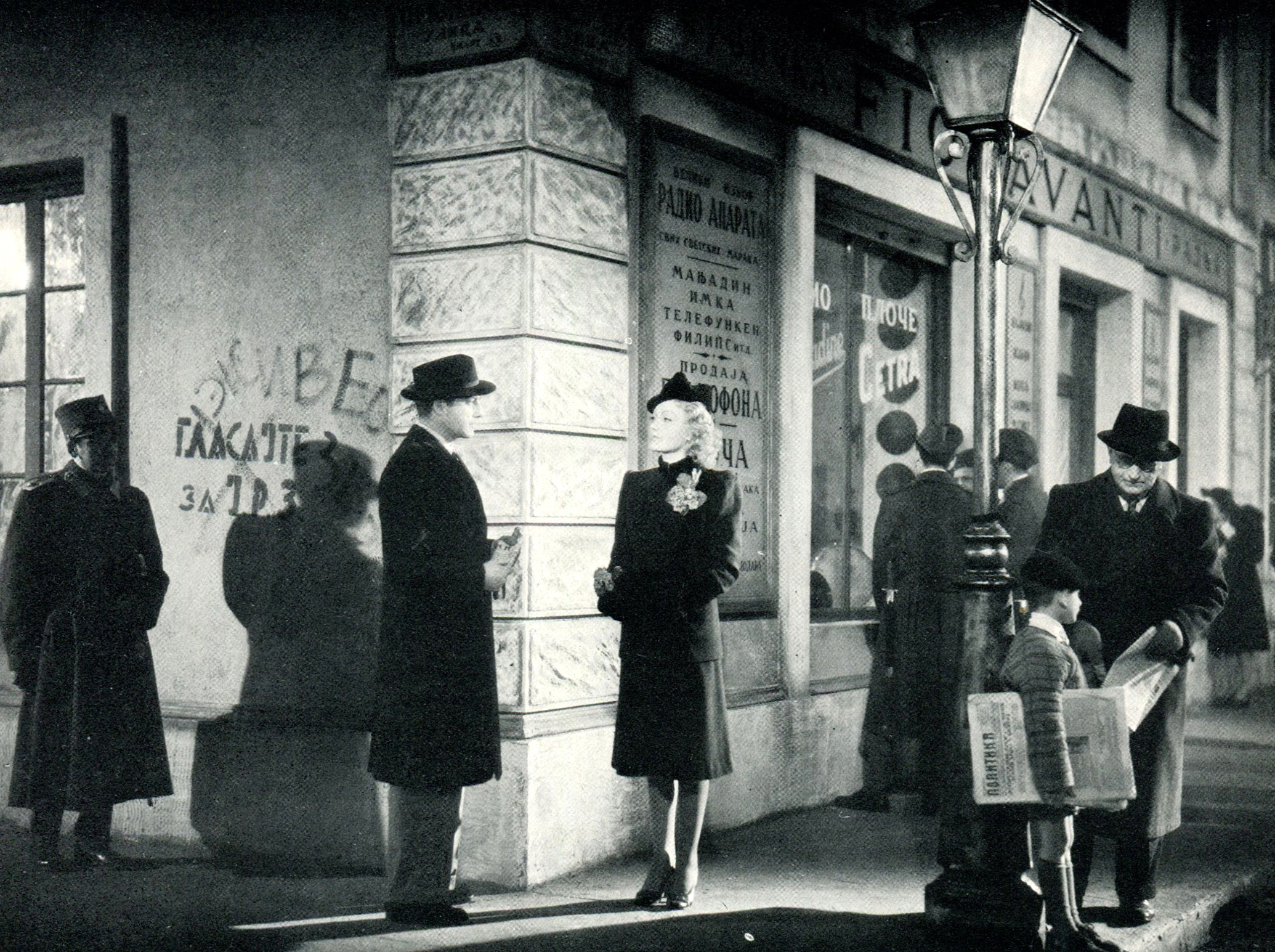 Una scena di Documento Z3 (Guarini, 1942) con Claudio Gora ed Isa Miranda